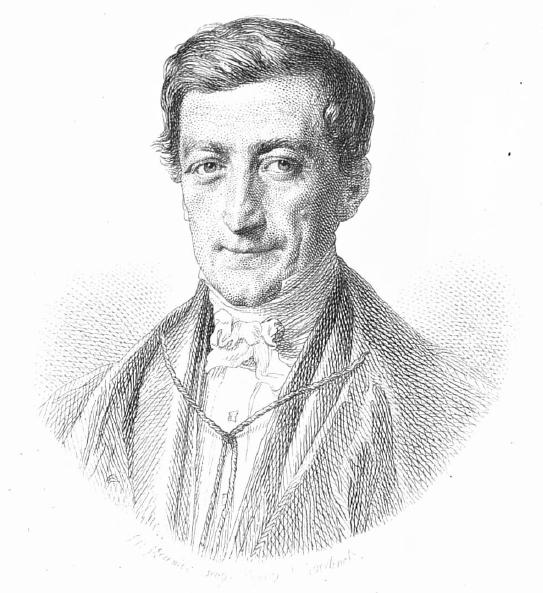 Monsieur François Niclas Baguet né à Nivelles en 1801 décédé en 1867. professuer à l'Université de Louvain, Membre de l'Académie Royale de Belgique, Pédagogue.